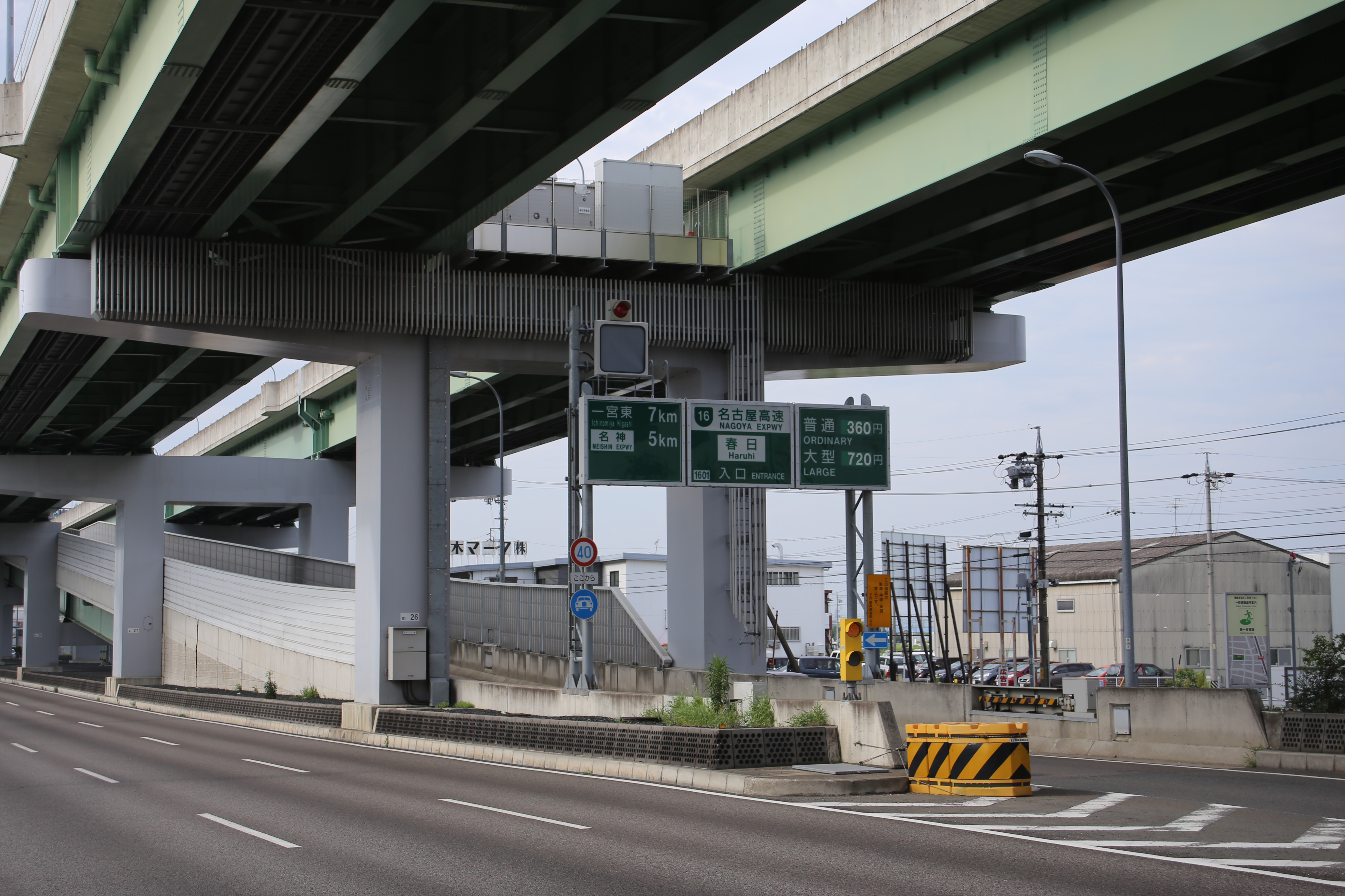 愛知県清須市の名古屋高速道路16号一宮線春日入口を歩道より撮影